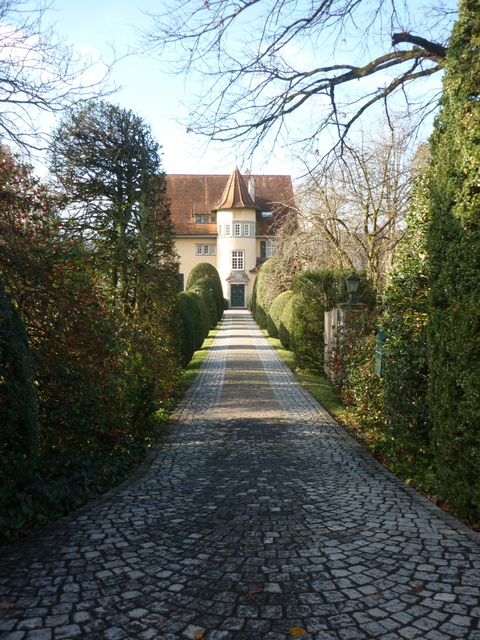 Wohnhaus von C.G.Jung. Zufahrt von der Seestrasse in Küsnacht.